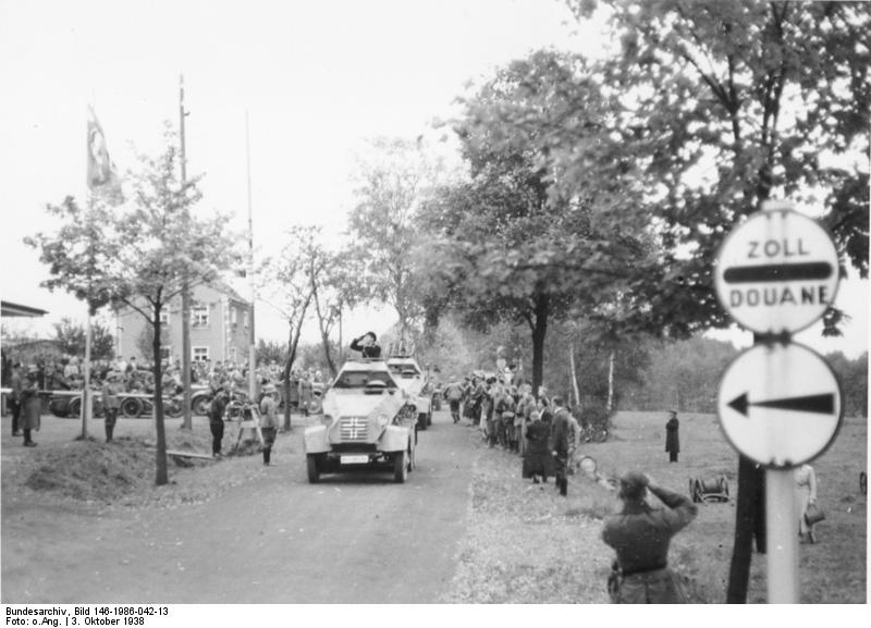 Einmarsch in das Sudetenland. Die Panzerspähwagen voraus, überschreiten deutsche Truppen um 8.00 Uhr die Zollgrenze des tschechischen Staates. Armored cars taking the lead German troops crossed the frontier of the Czech state on the 10th of march, 1938 3.10.1938 8.00 Uhr Schirnding. Sudetenland